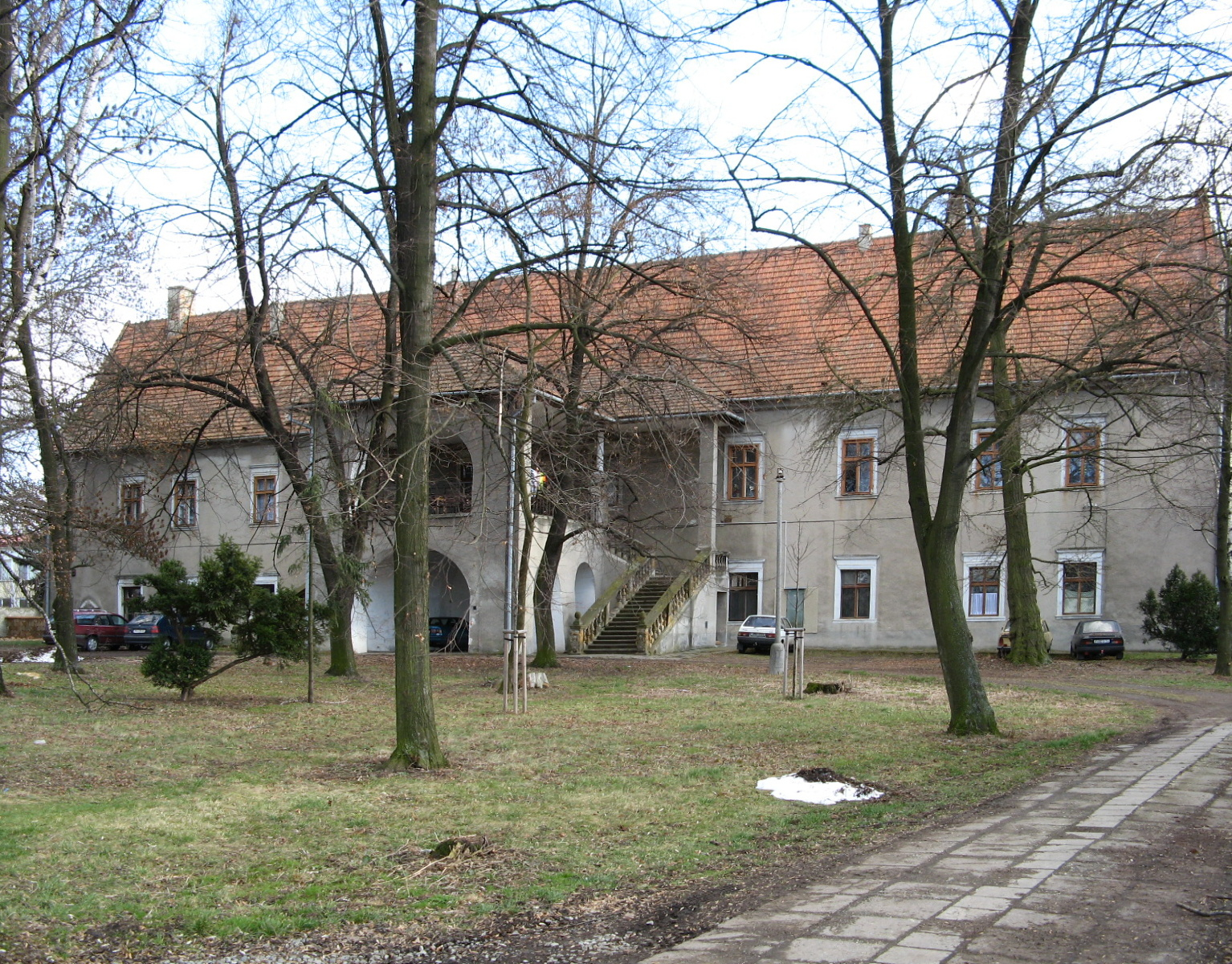 Zámek Hrubčice, Hrubčice 1